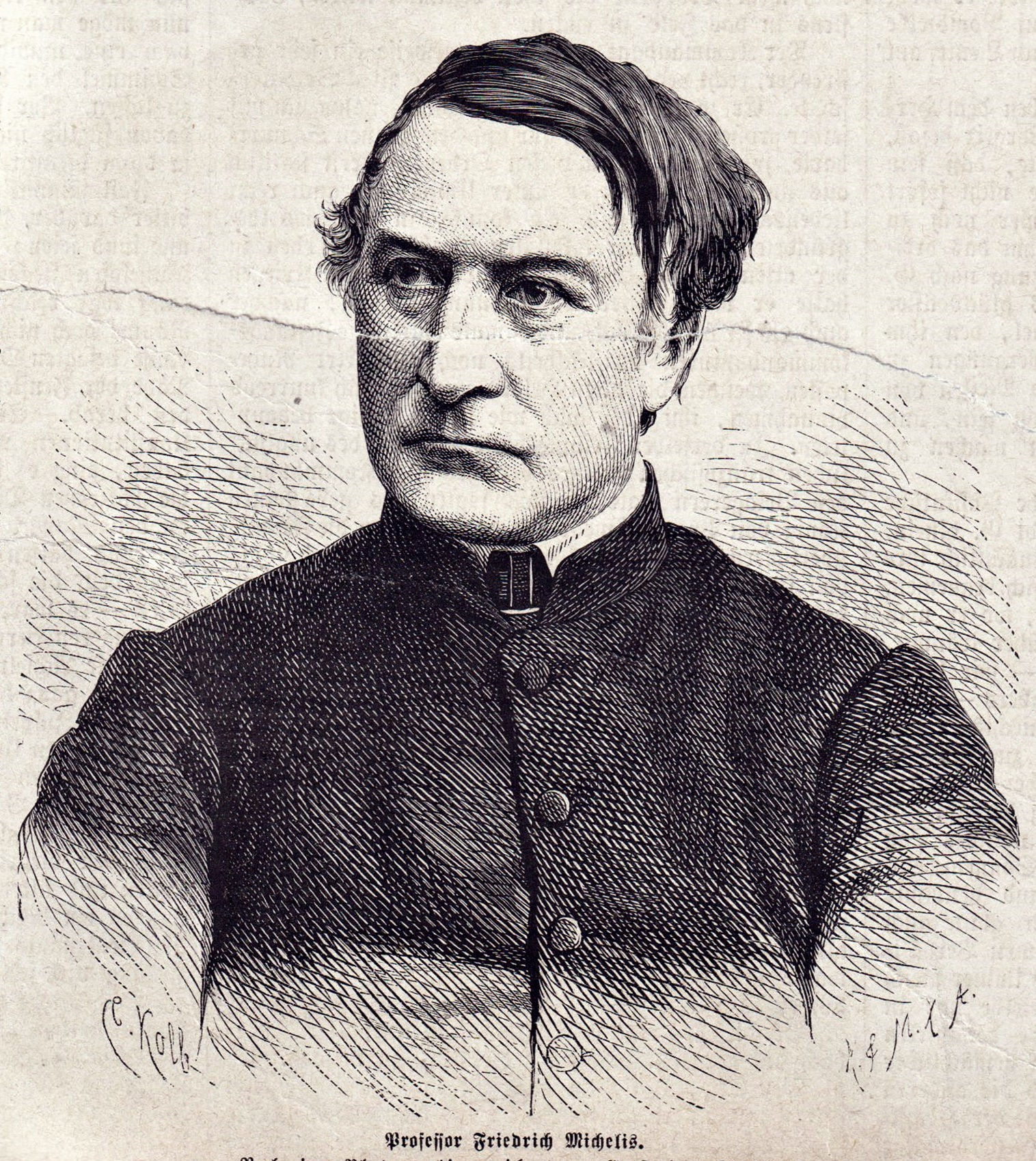 Friedrich Michelis (+ 1886), Theologe, Philosoph, Politiker